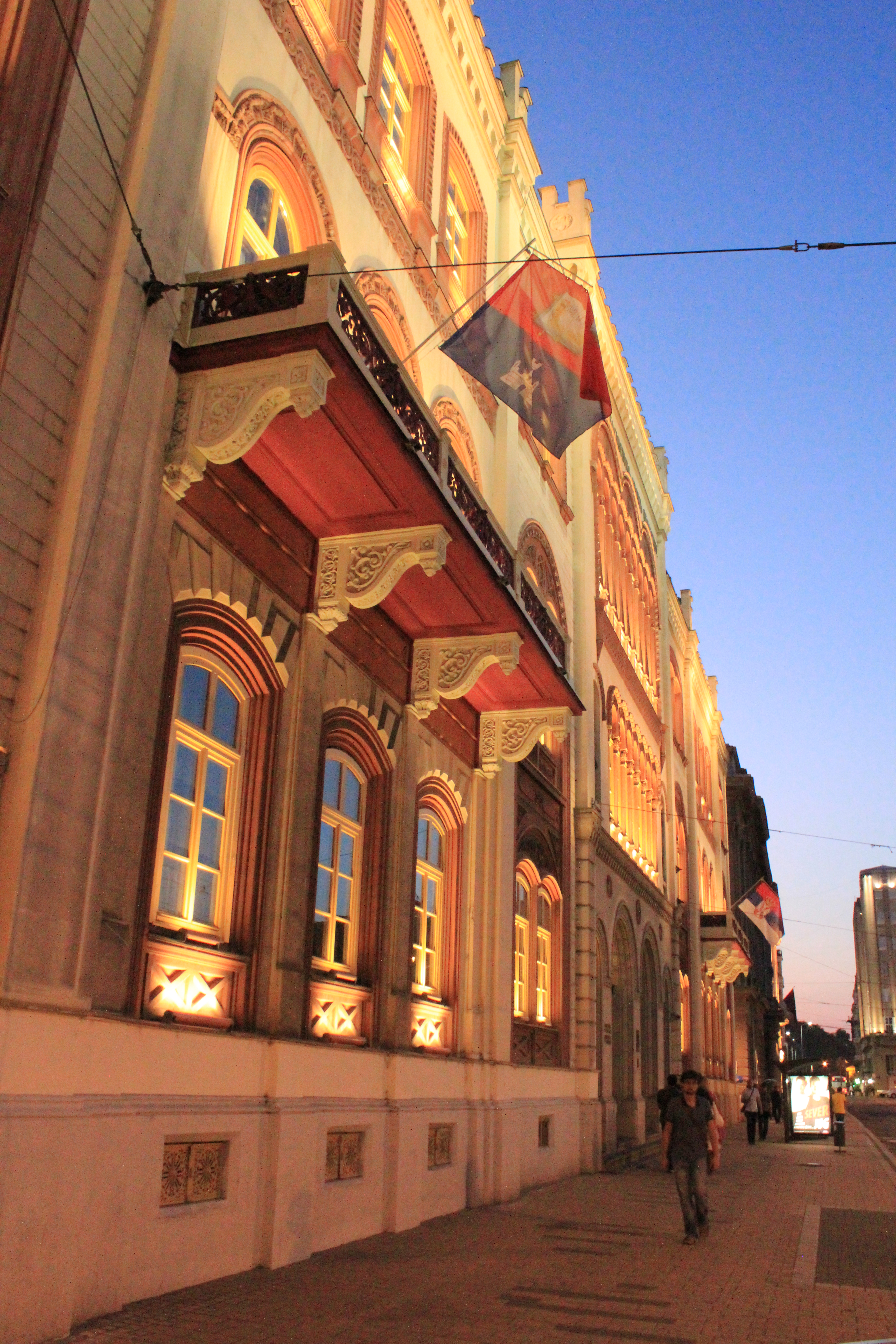 Kapetan Mišino zdanje